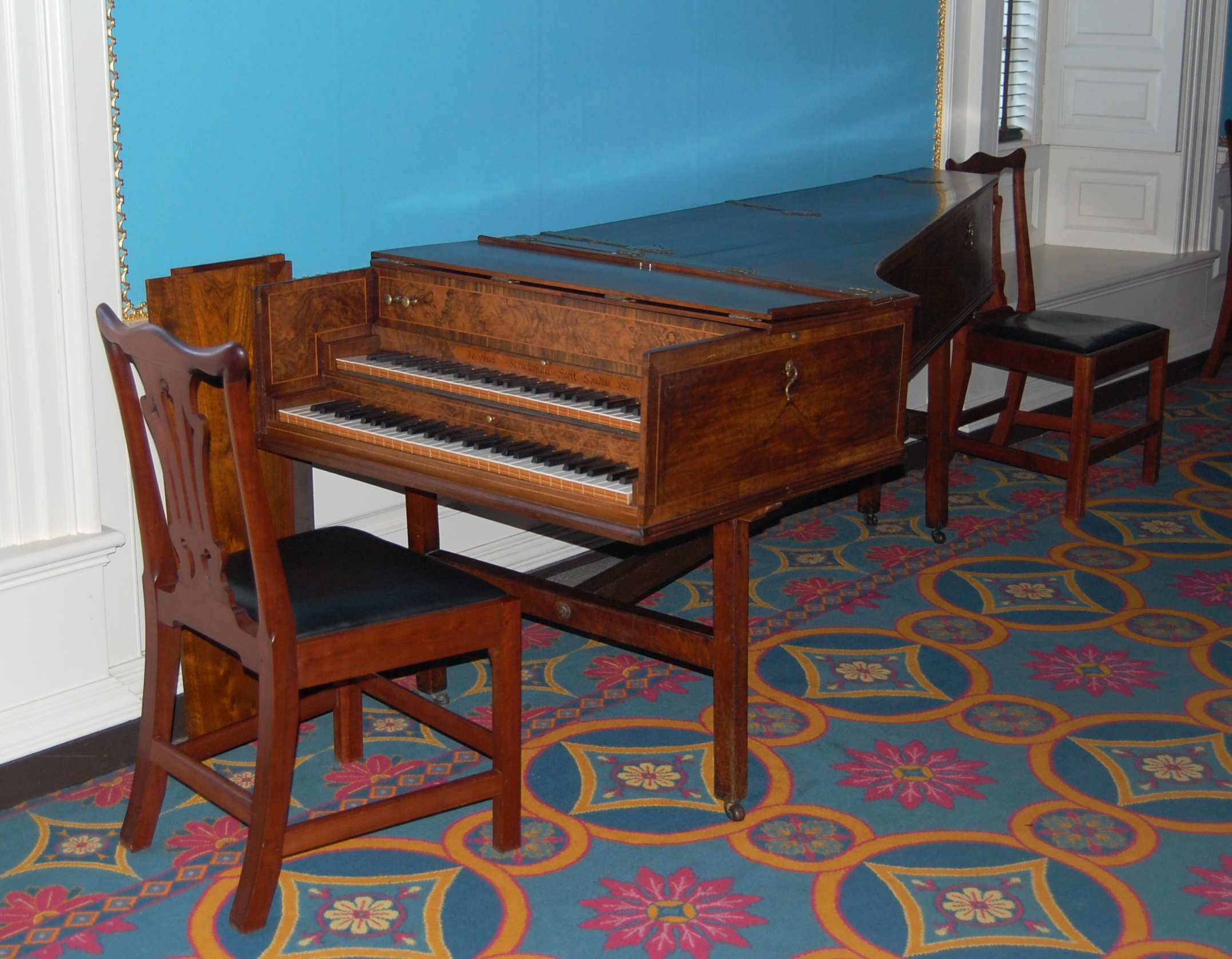 Clavecin fait par Jacob Kirkman (Londres, 1758) - Palais du Gouverneur à Williamsburg